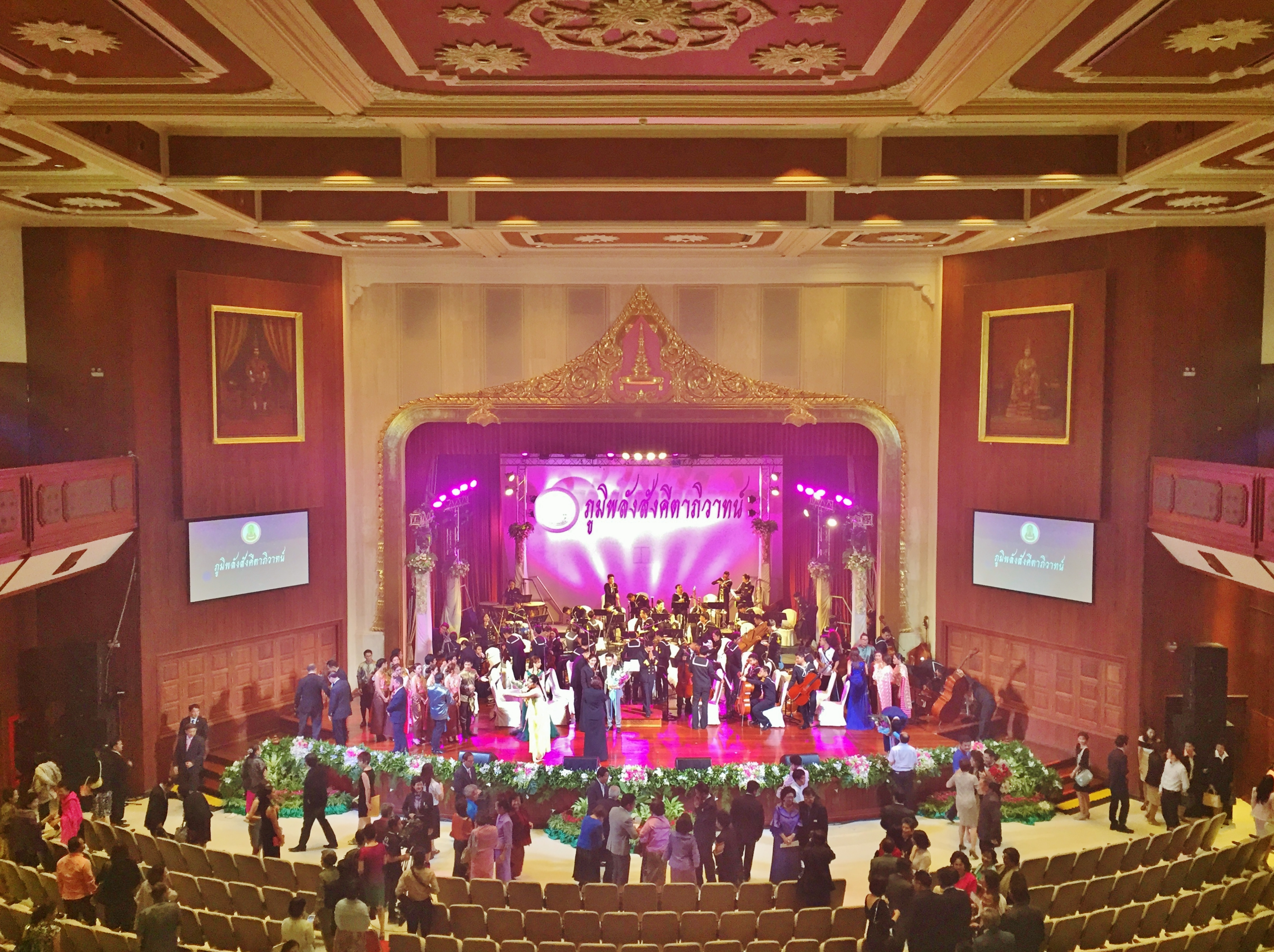 ภายในหอประชุมจุฬาลงกรณ์มหาวิทยาลัย